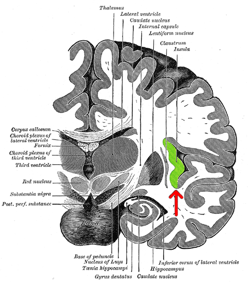 insular cortex.